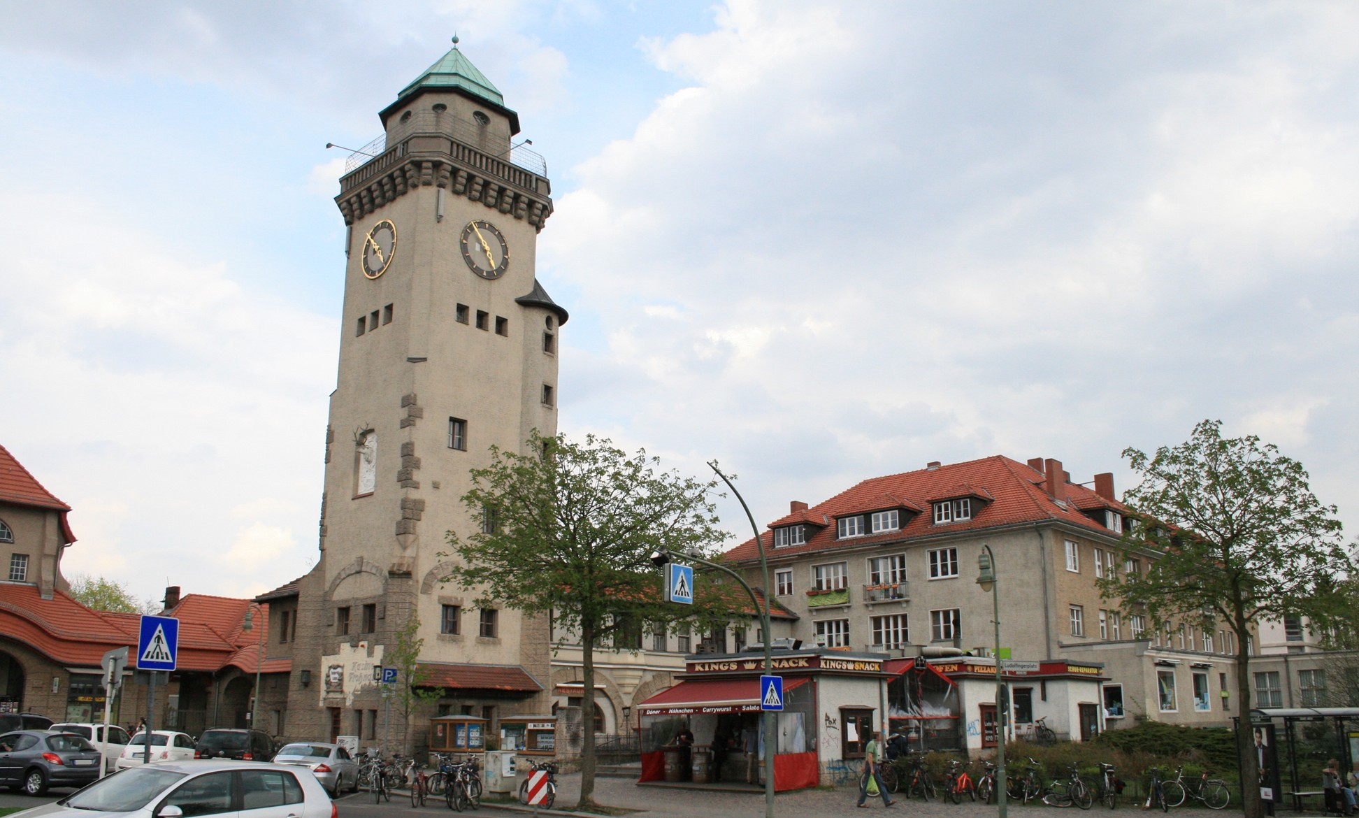 Berlin-Frohnau, Ludolfingerplatz 1_3. Kasino Frohnau. Geschäfts- und Wohnhaus mit Aussichts-Wasserturm.